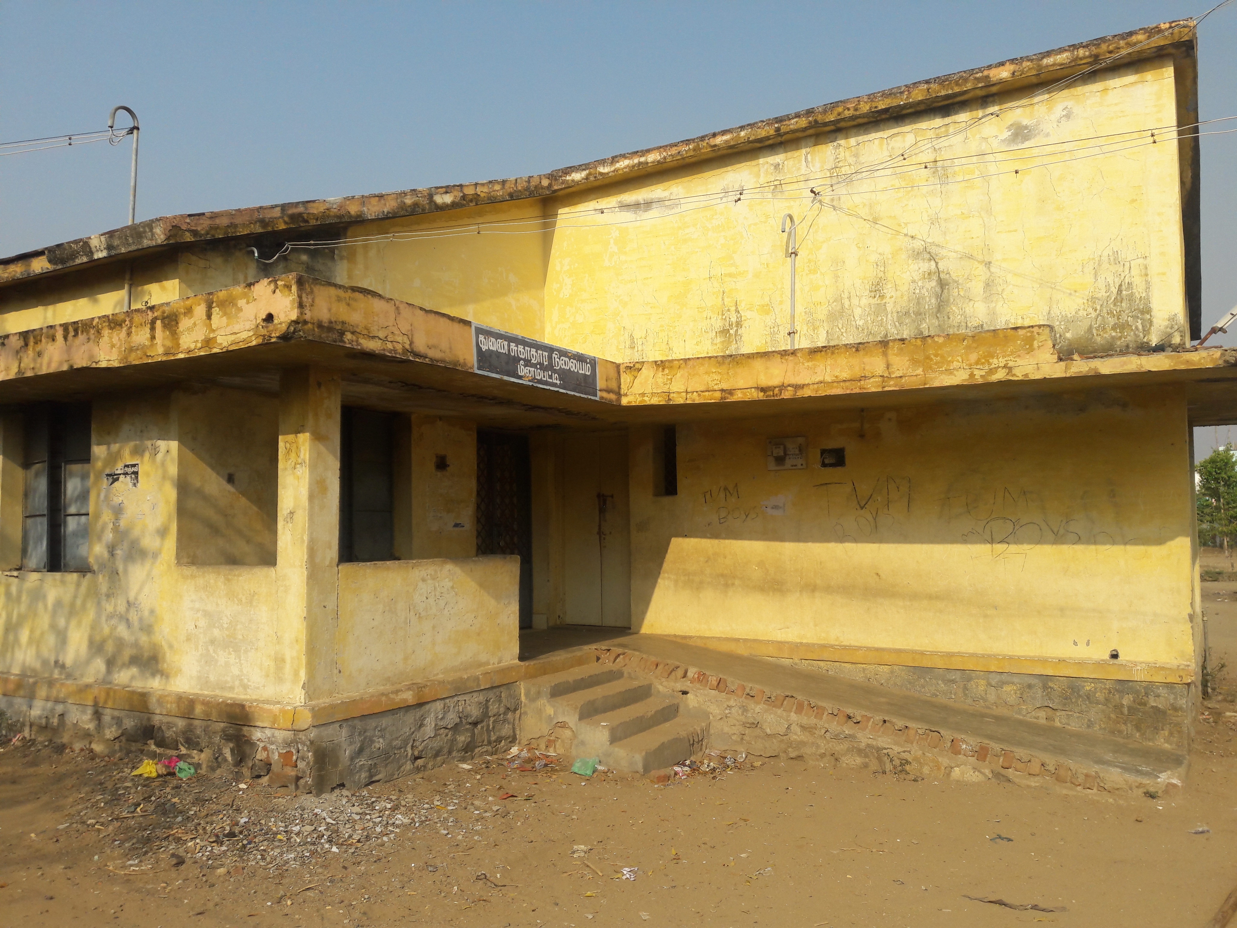 மீனம்பட்டி துணை சுகாதார நிலையம்